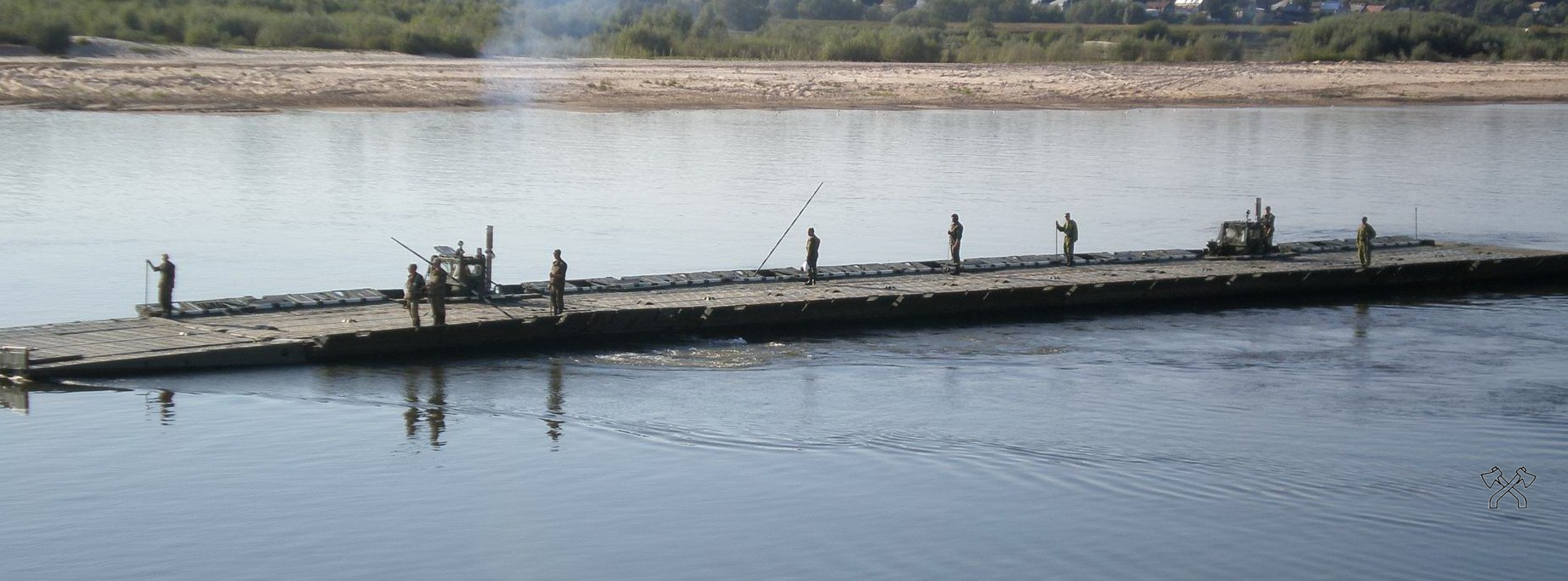 ПП-91М